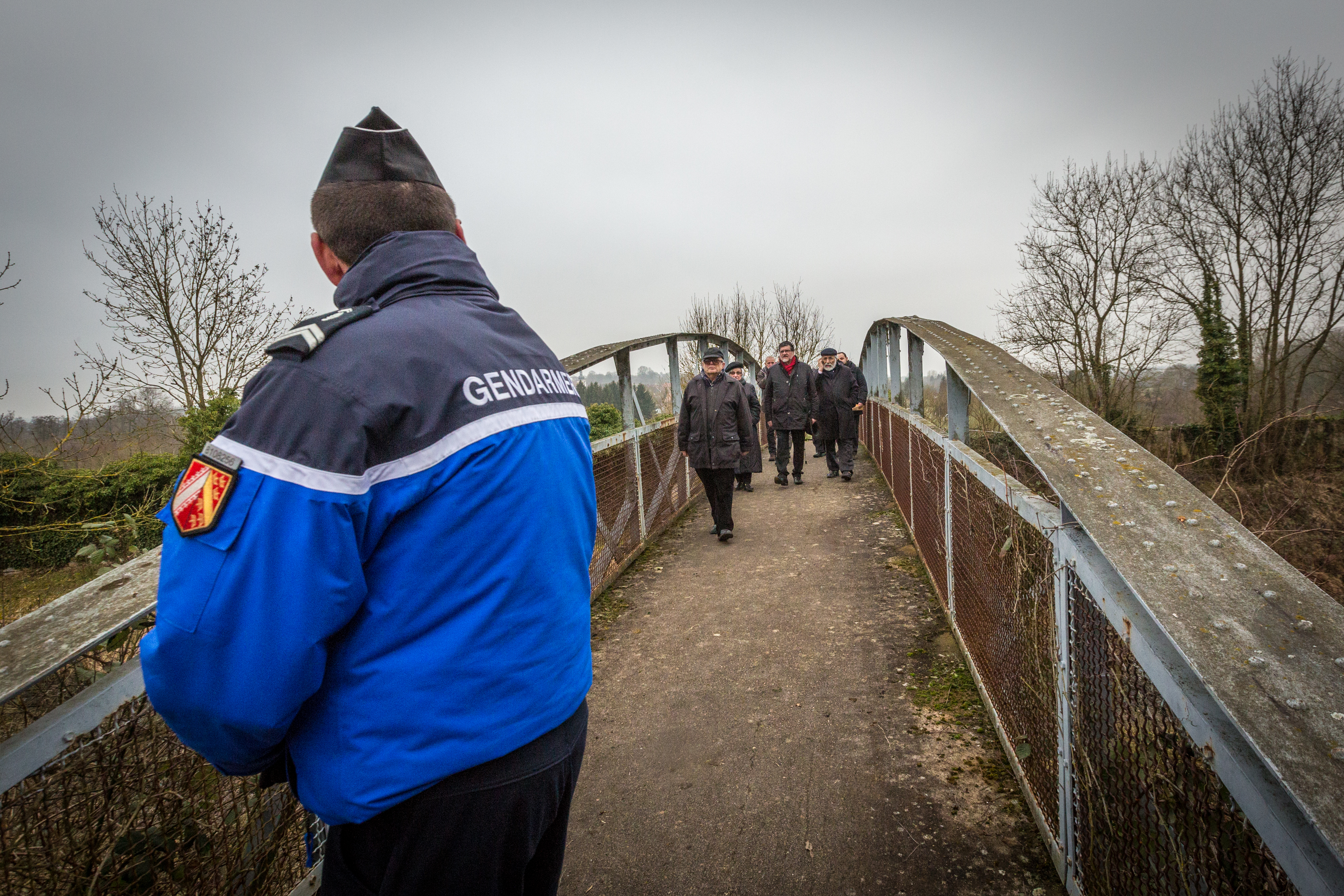 La passerelle menant au cimetièe juif le 16 février 2015